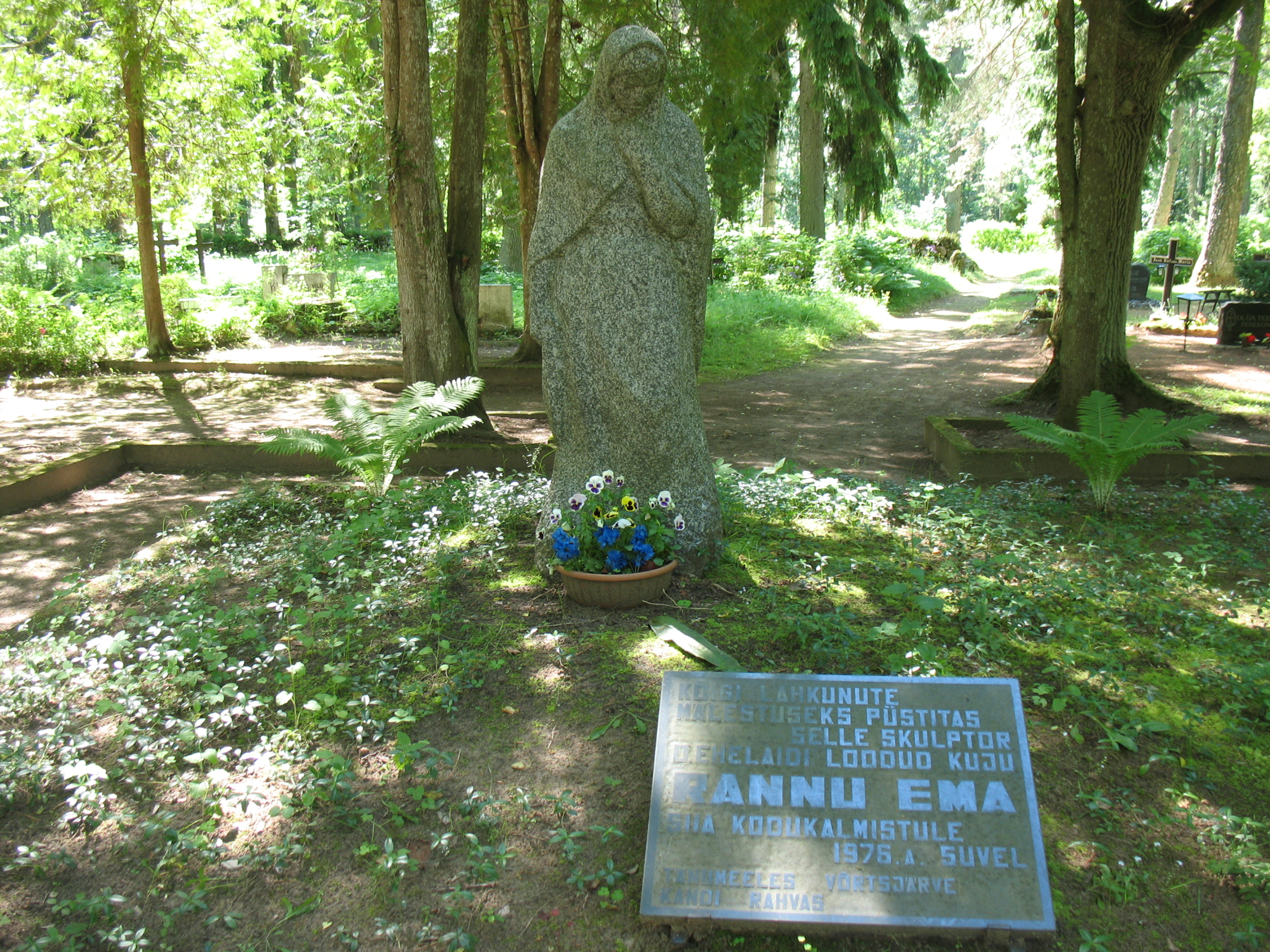 Rannu kalmistu